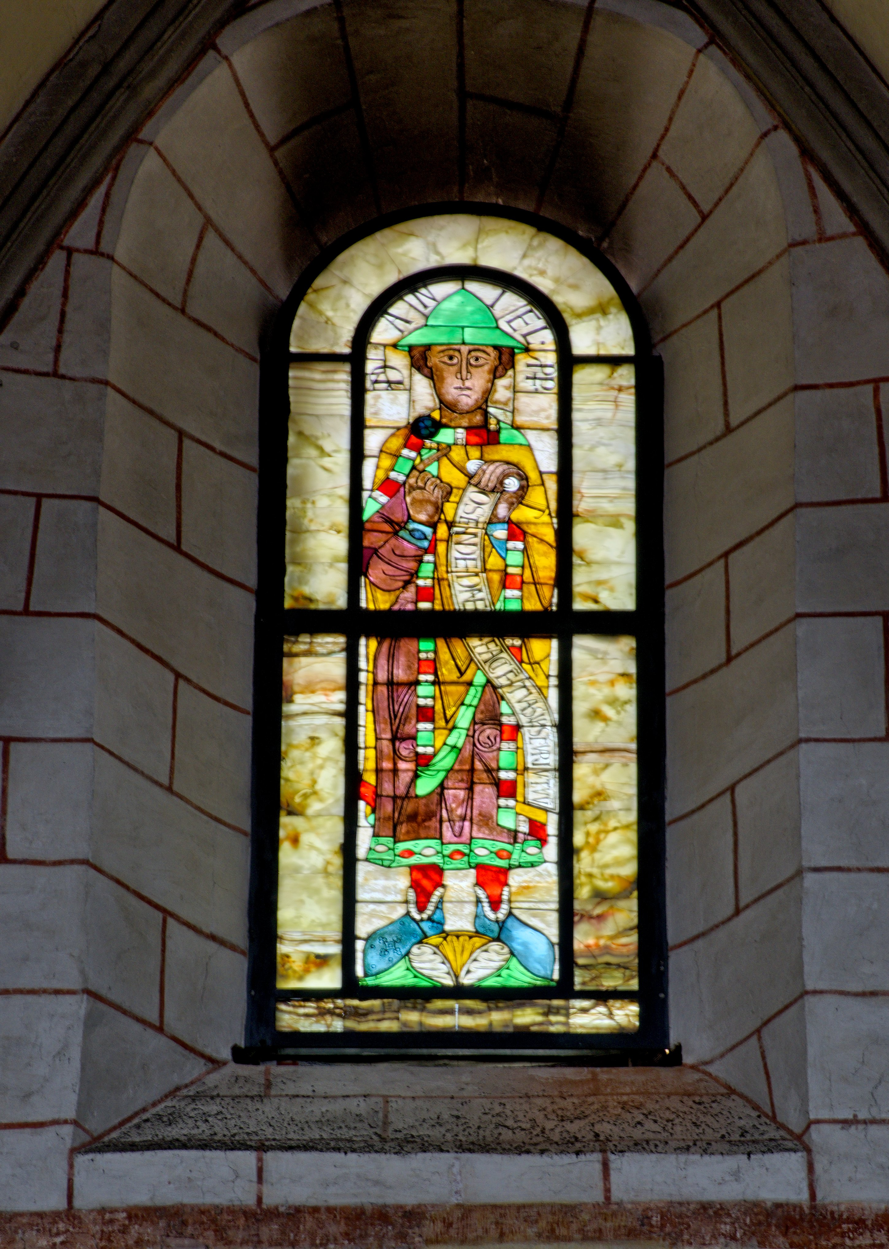 Bilder aus dem Augsburger Dom